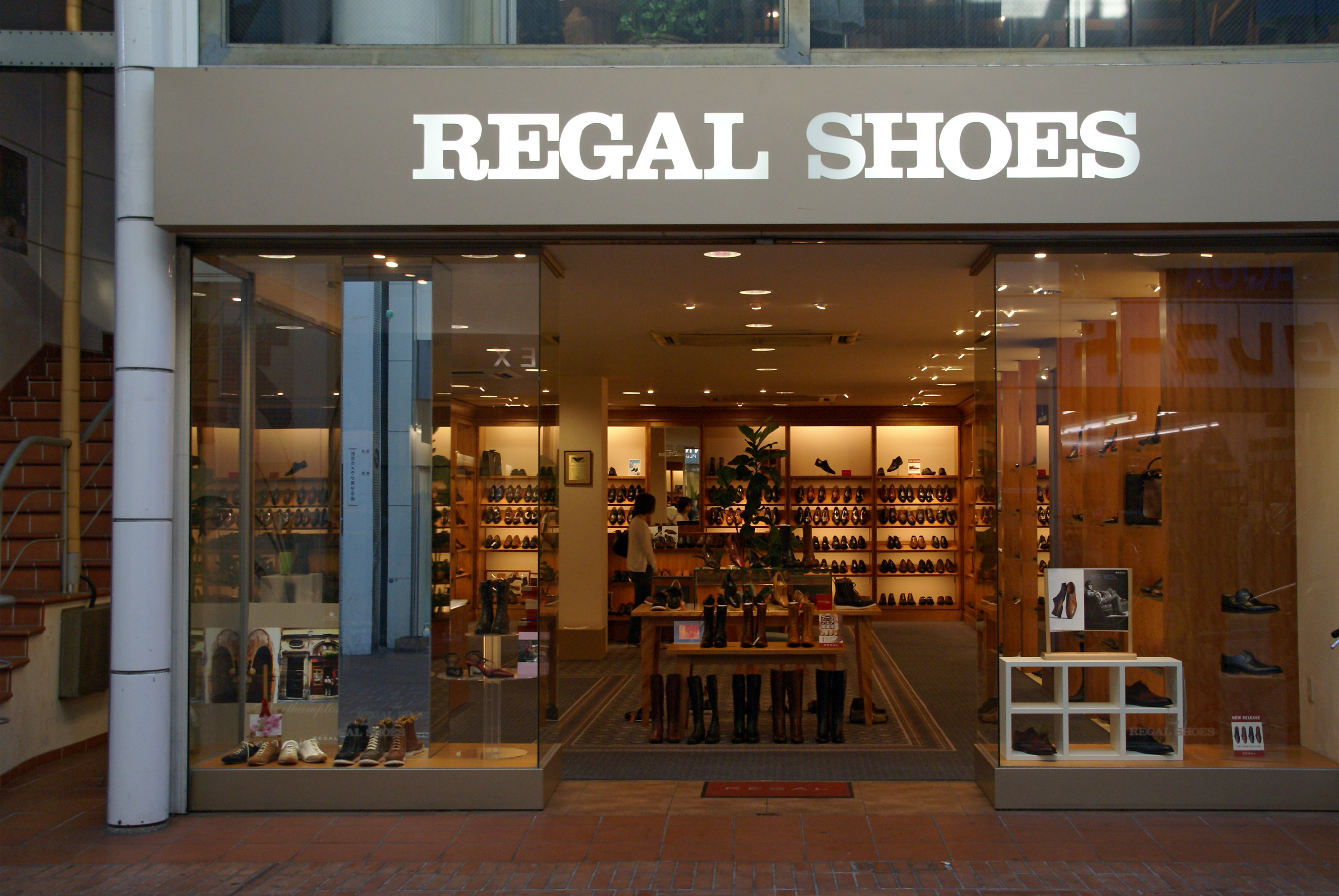 REGAL Tokushima shop in Tokushima, Tokushima prefecture, Japan